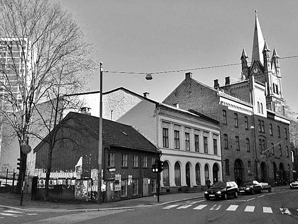 Grønlandsleiret 28 i forgrunnen, Oslo